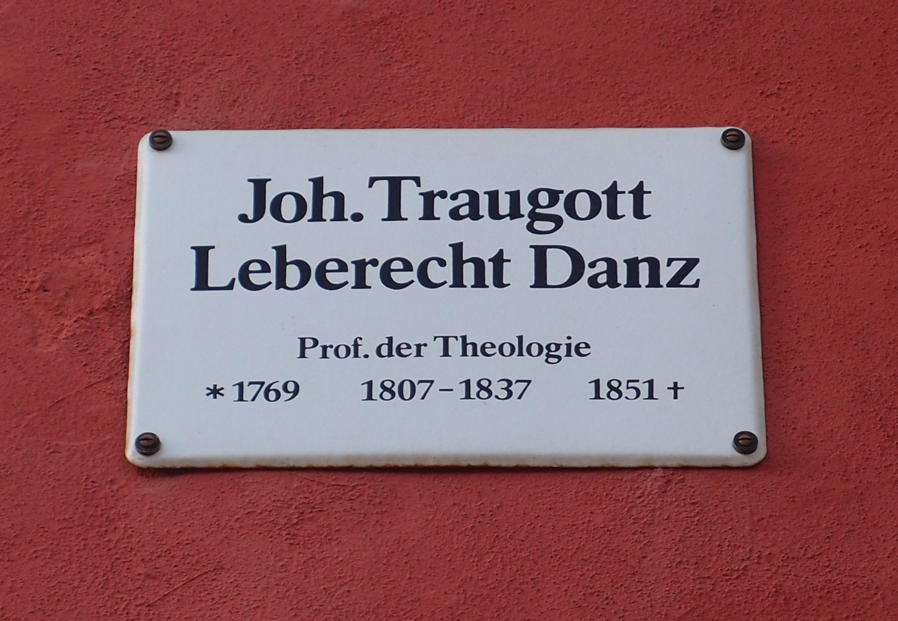 Gedenktafel für den Kirchenhistoriker und Theologen Johann Traugott Leberecht Danz in Jena, Johannisstraße 14